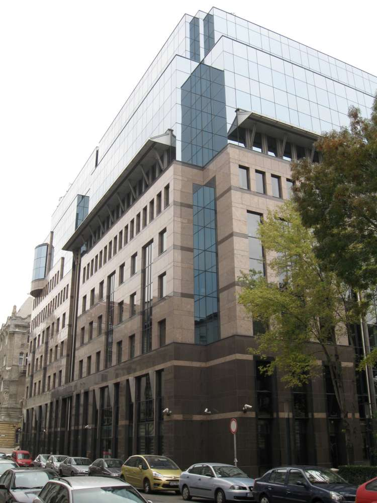 A Bank Center épülete (Budapest, V. ker., Szabadság tér délkeleti sarka)